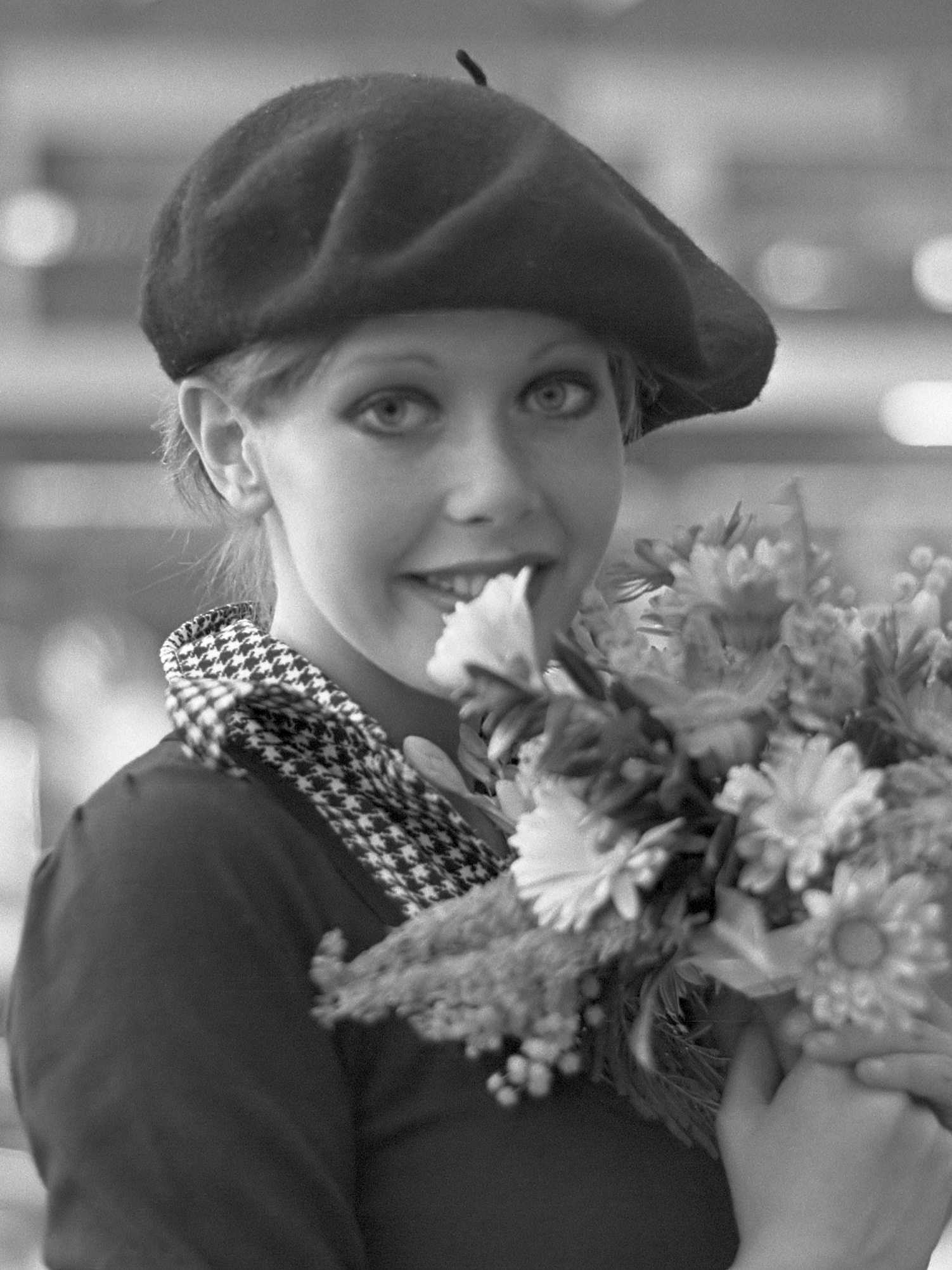 Sylvia Kristel krijgt, als winnares van de Miss TV Europa verkiezing, een Mercedes 350 SL op de RAI 16 februari 1973